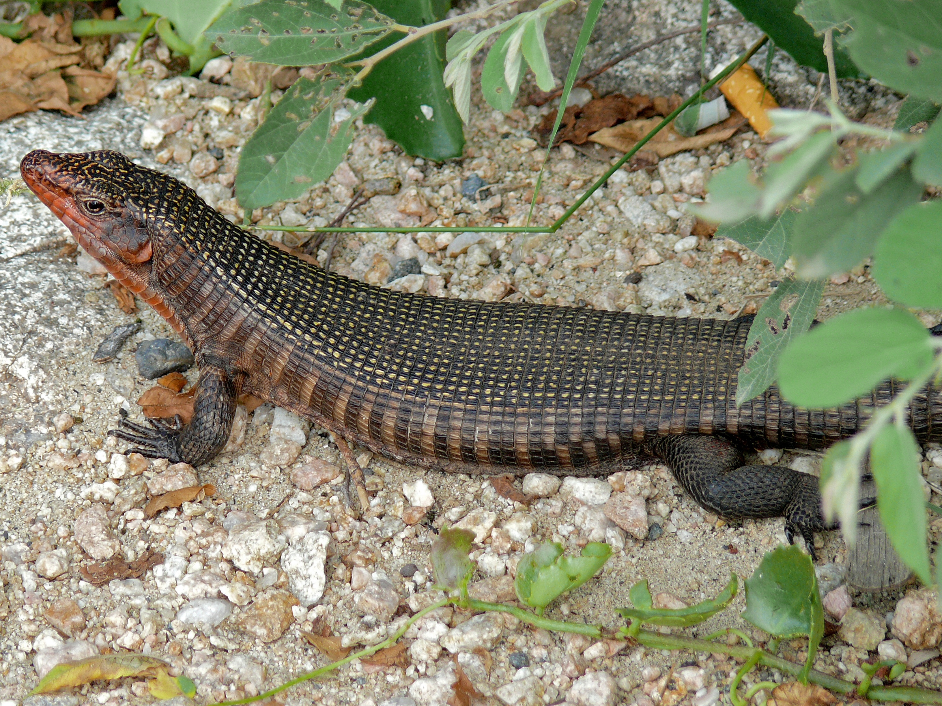 N'wamanzi H1-5 near Olifants, Kruger NP, SOUTH AFRICA